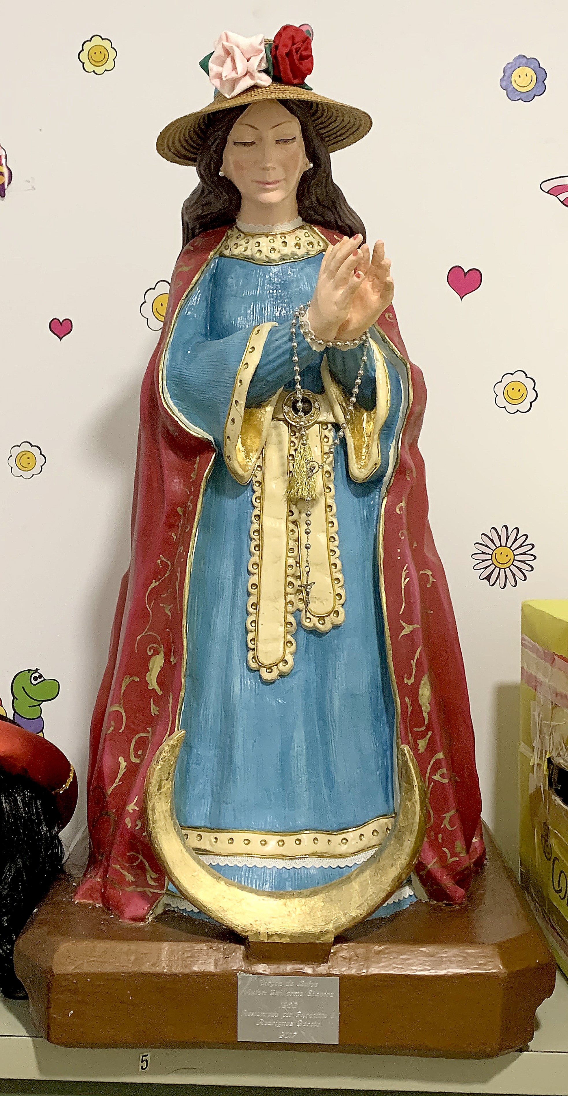 Vista frontal de la imagen de la Virgen de Bótoa realizada por Guillermo Silveira en 1964.